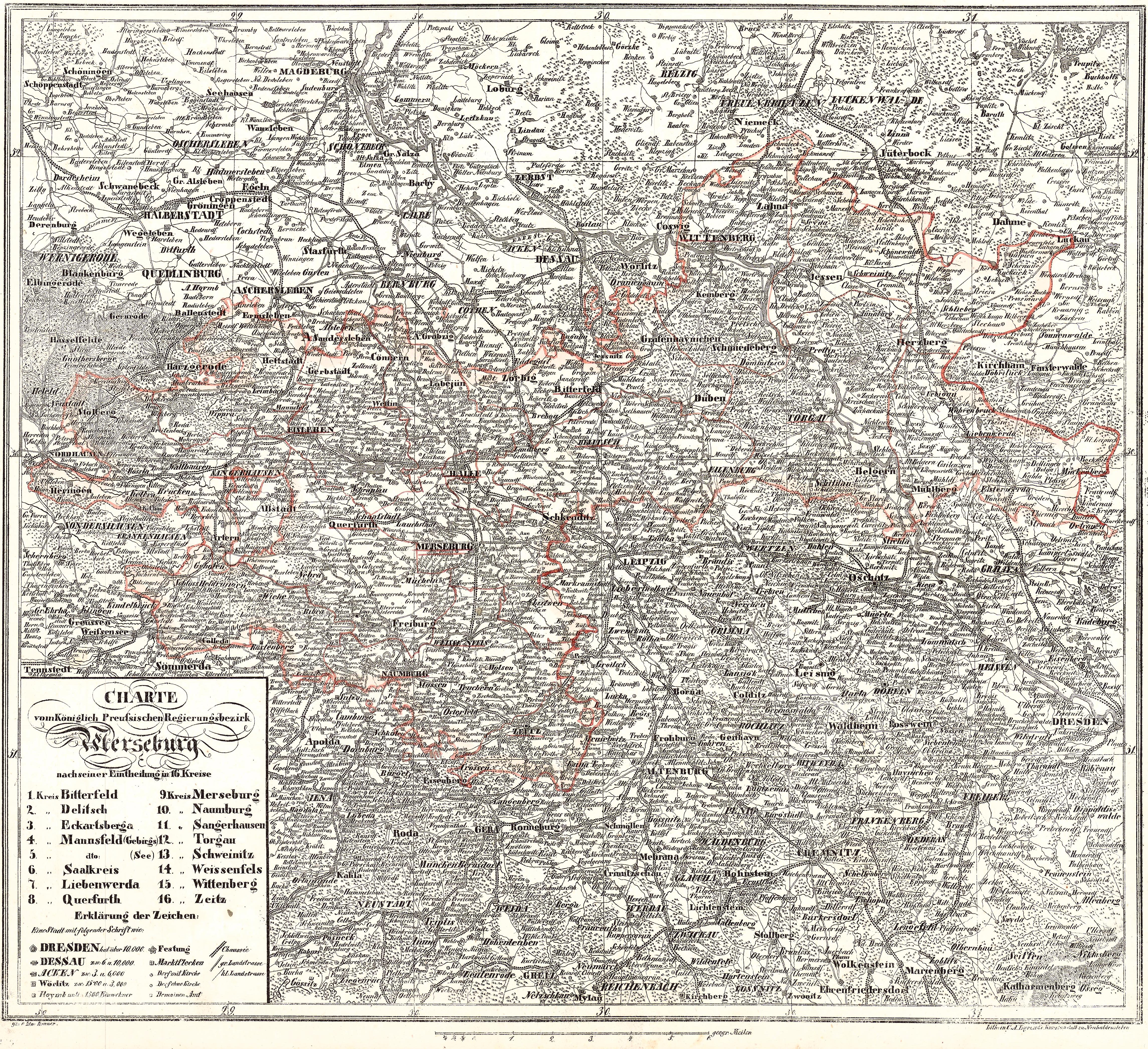 Charte vom Königlich Preussischen Regierungsbezirk Merseburg nach seiner Eintheilung in 16 Kreise